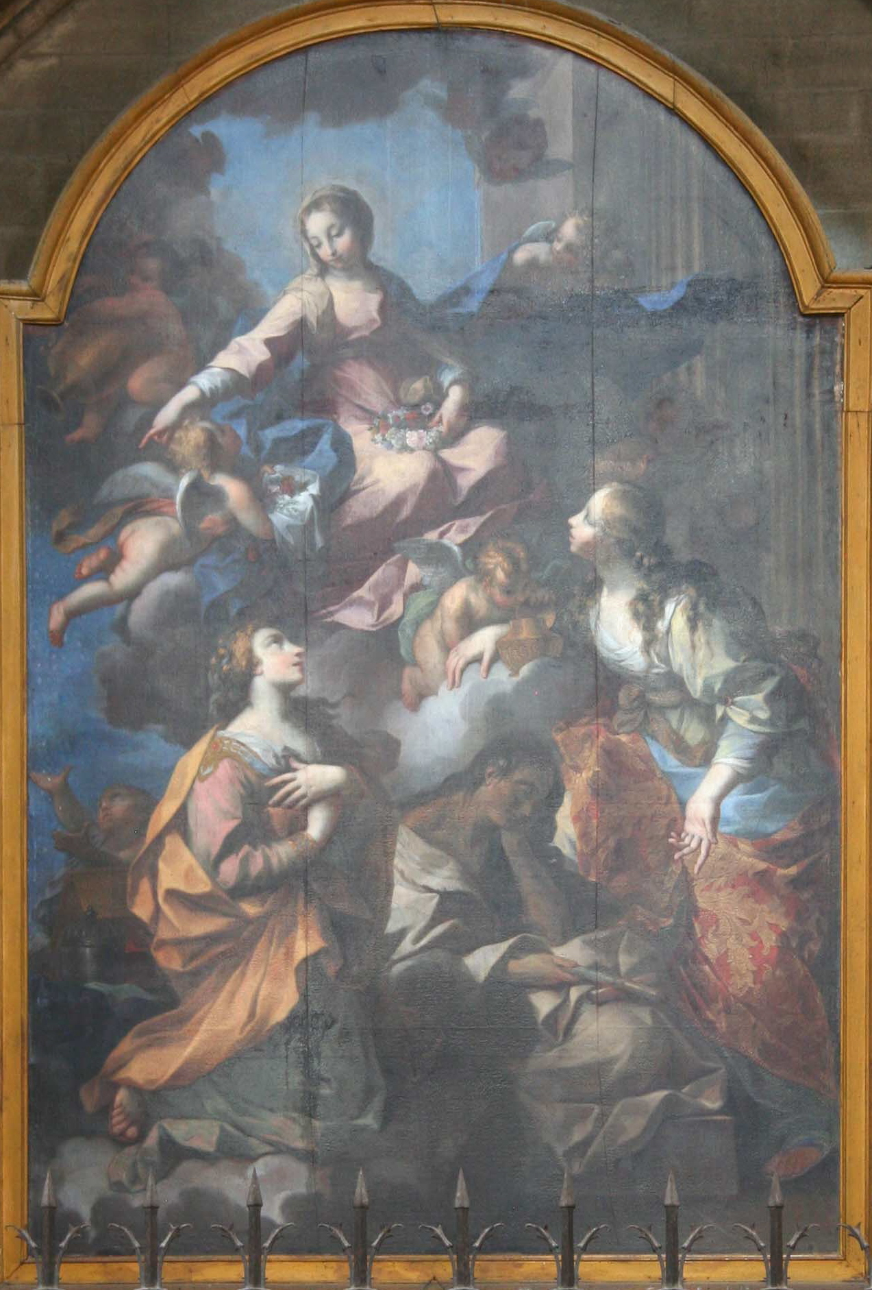 Tableau de Pierre Parrocel (1670-1739) représentant sainte Marie l'égytienne dans l'église Sainte-Marthe à Tarascon.